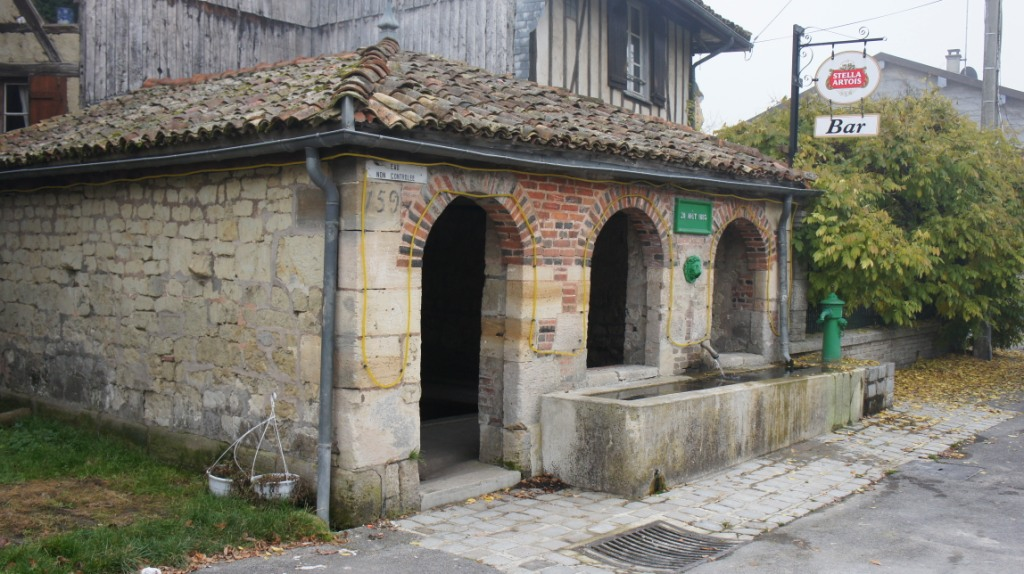 Lavoir du village de Moiremont.